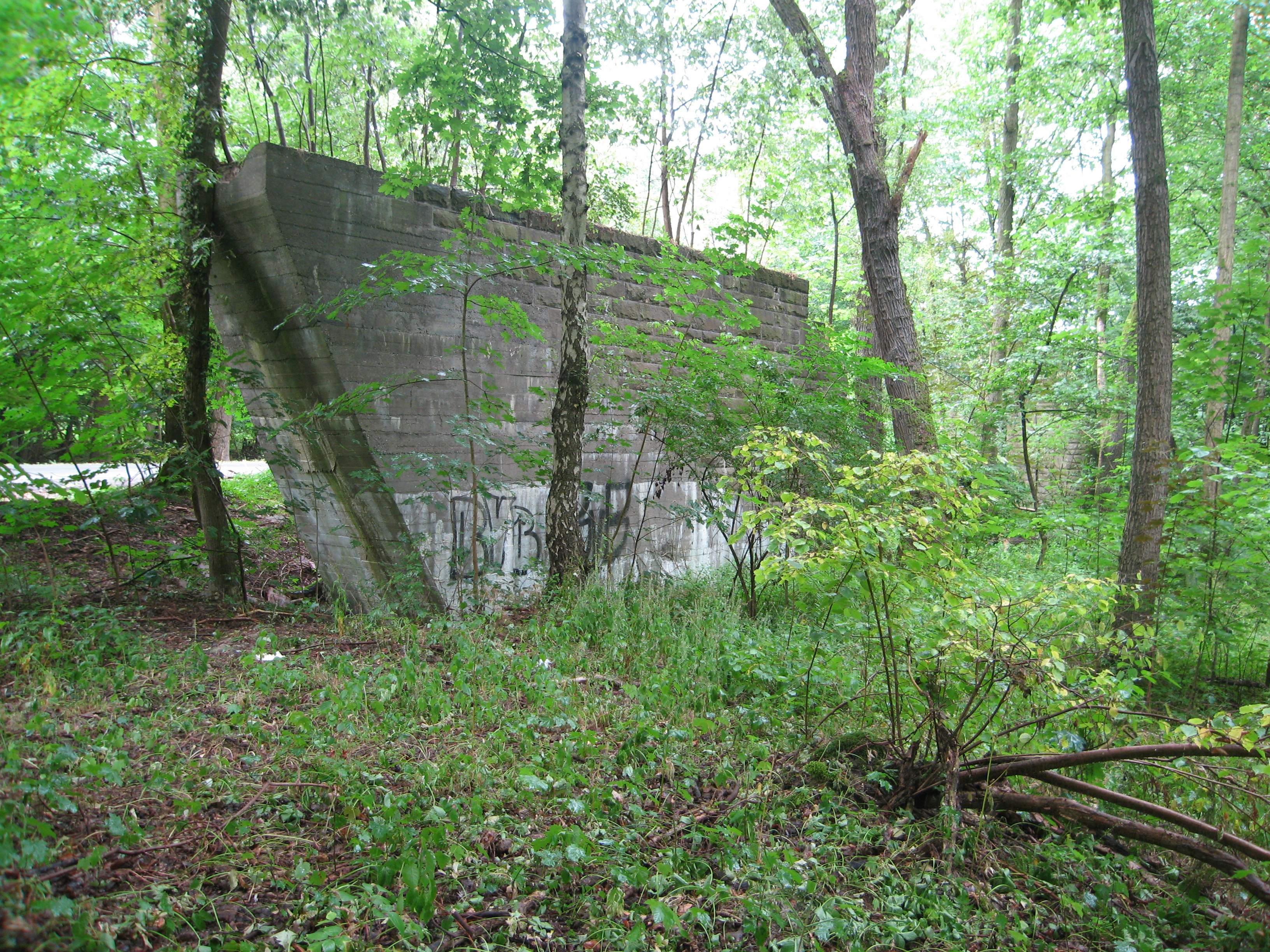 Hochbauten und Trassengrundstücke der Strecke 77, Bauzeit 1937–1942, Baudenkmal seit März 2013This is a photograph of an architectural monument.